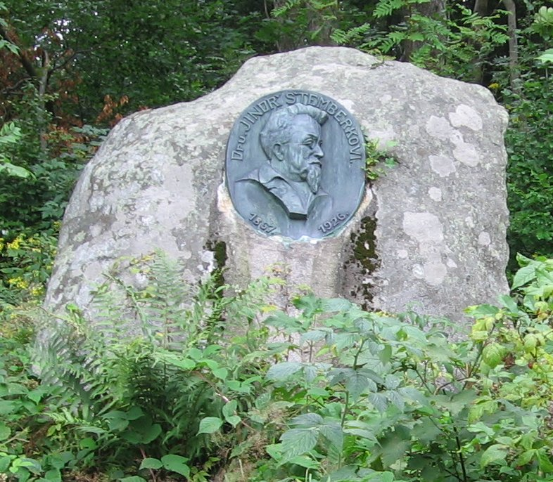 Pamětní deska propagátoru turistiky a politikovi Jindřichu Štemberkovi nad chatou Panorama v Deštném v Orlických horách